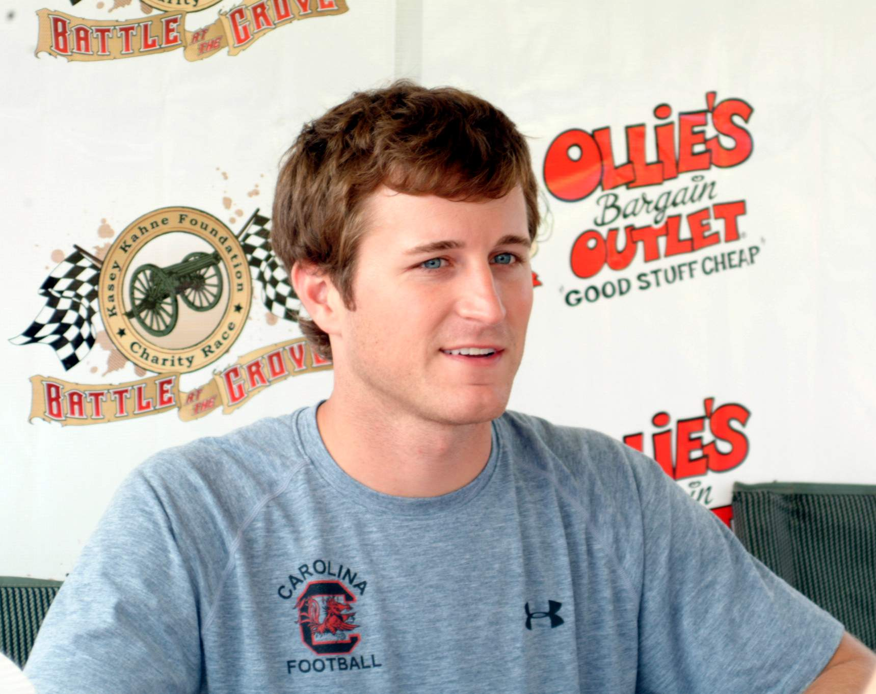 NASCAR driver Kasey Kahne